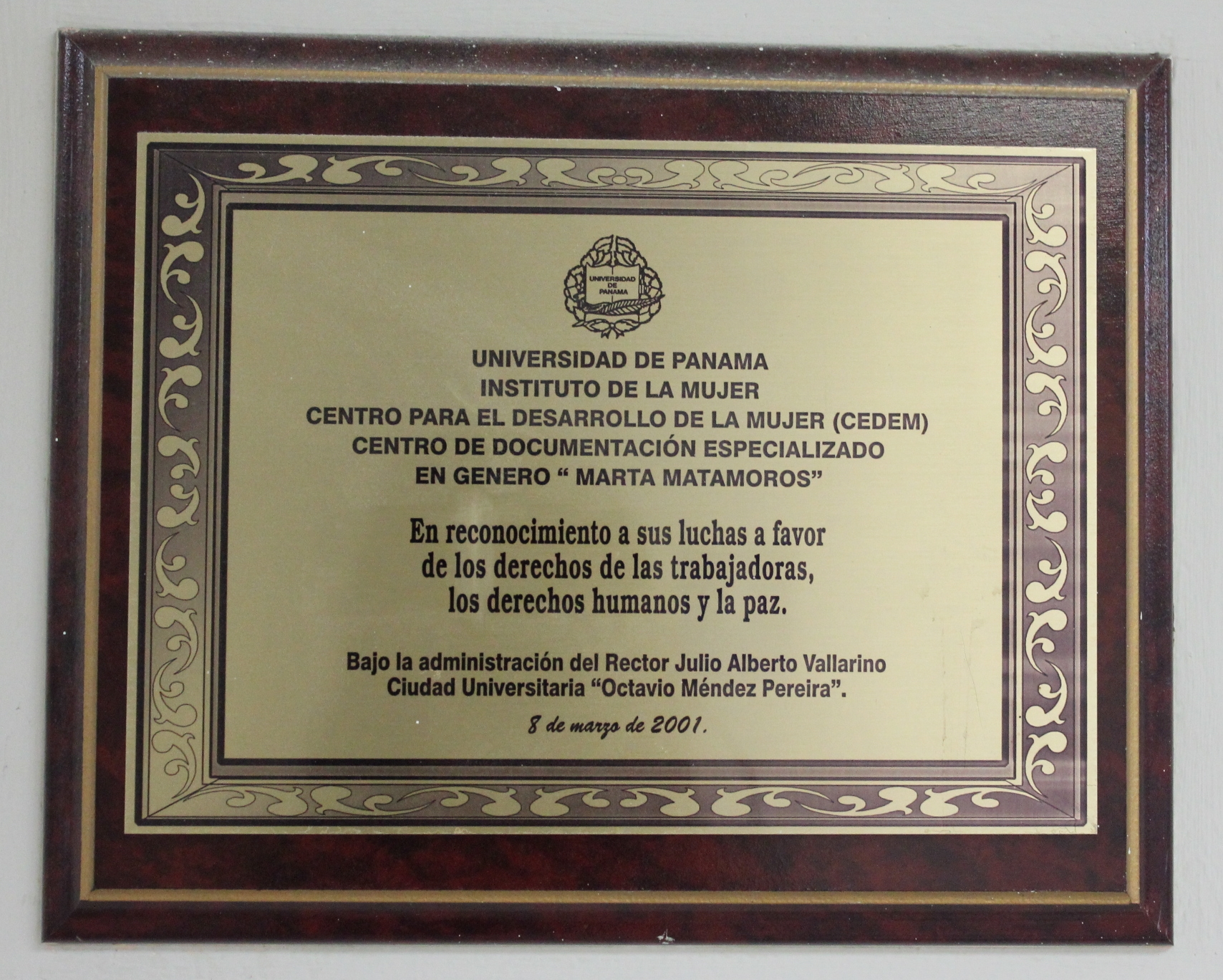 Placa del Instituto de la Mujer de la Universidad de Panamá donde se declara el Centro de Documentación Especializado en Género en honor a Marta Matamoros